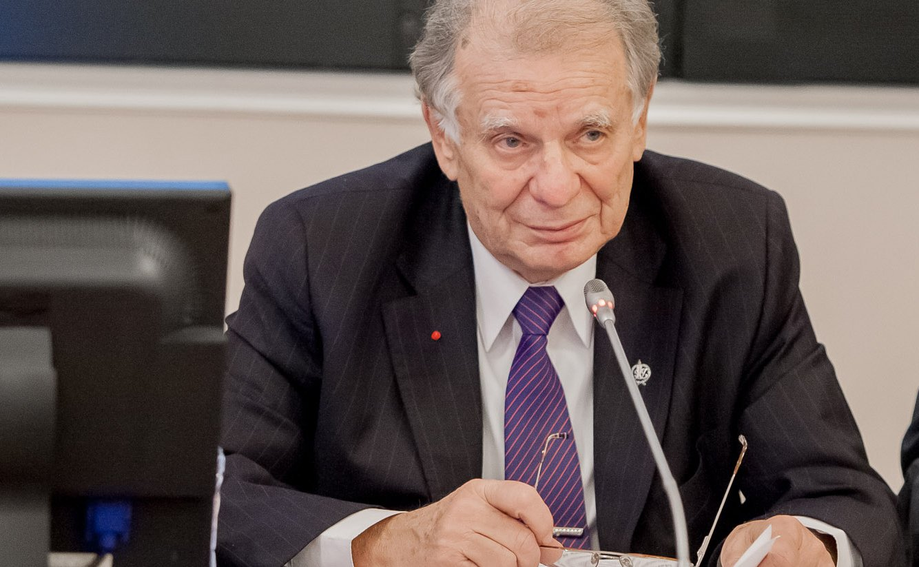 Жорес Иванович Алфёров (род. 1930) — российский физик